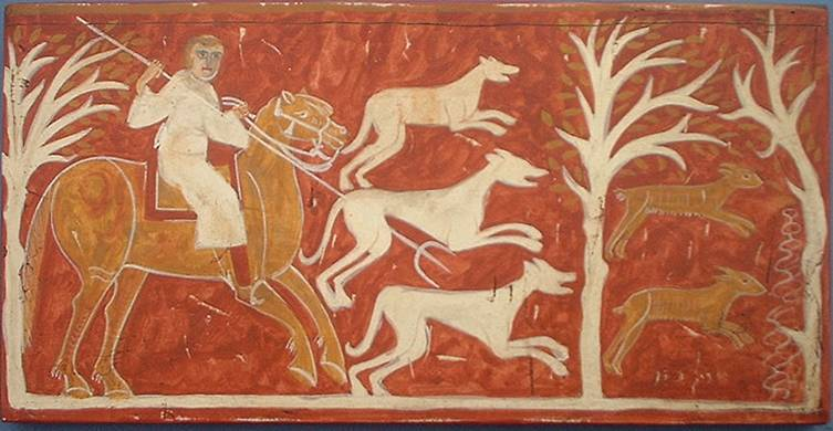 Galgos en la ermita de San Baudilio